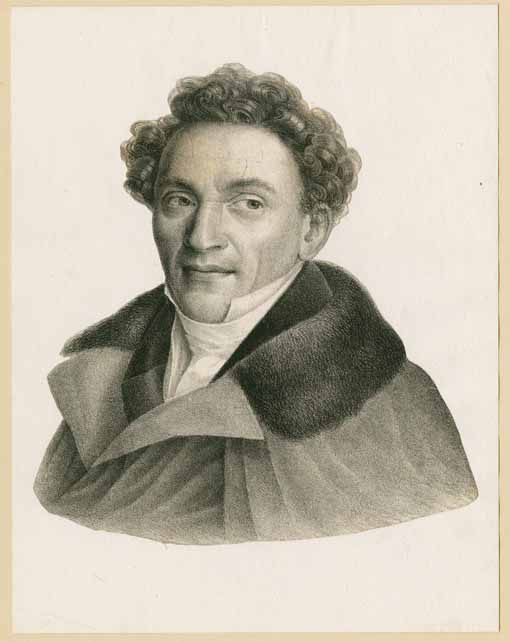 Johann Karl Friedrich Jost (1789–1870), deutscher Schauspieler und Sänger